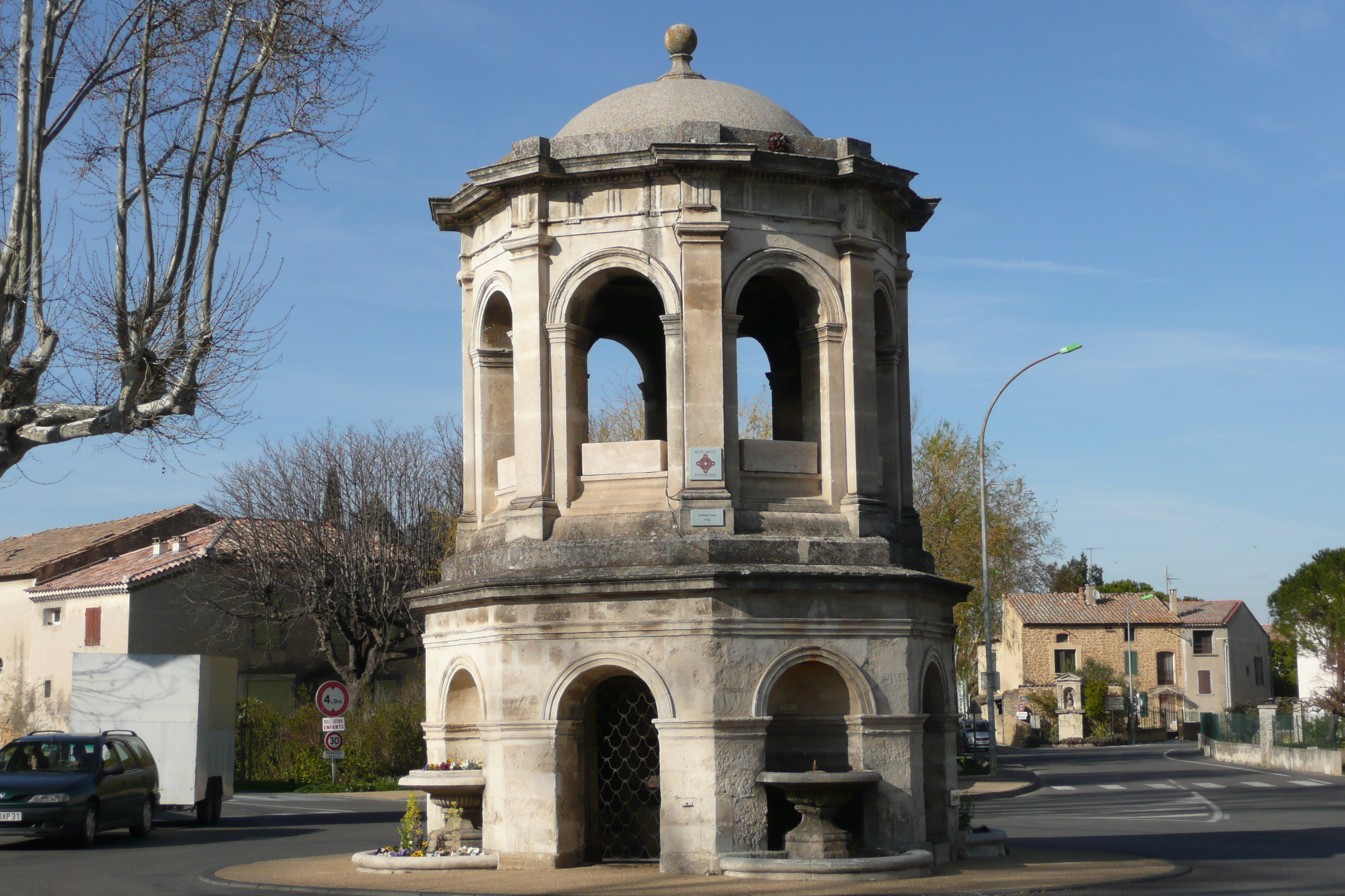 Château d'eau 1745 à Bédarrides.